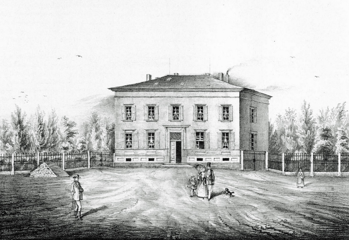 Das Herrenhaus des Gutes Mausitz um 1850